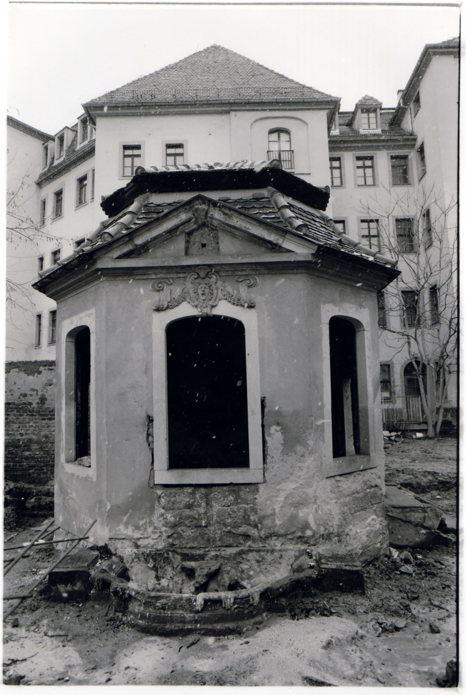 Pavillon